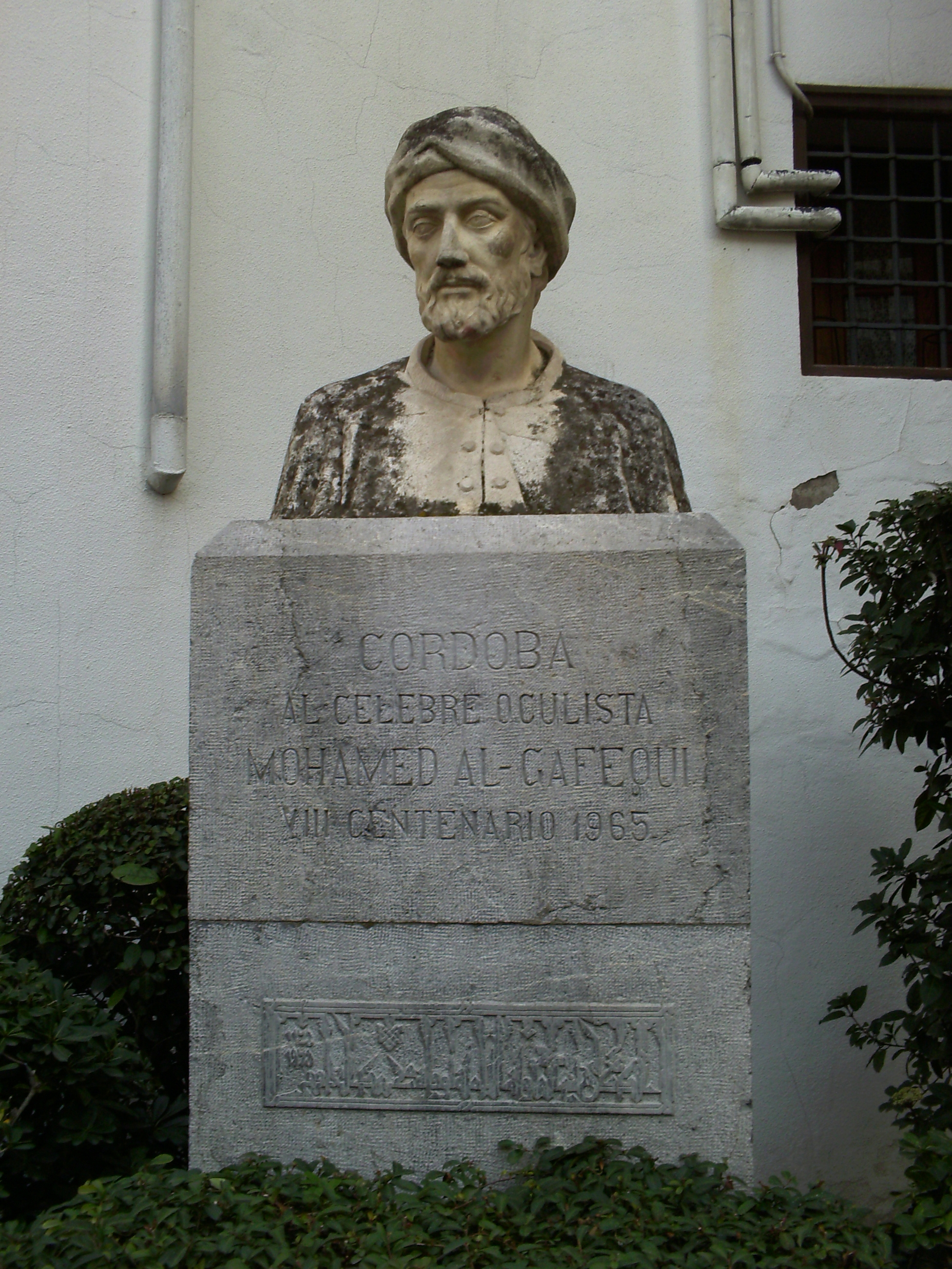 Busto de Mohamed al-Gafiquí en Córdoba.